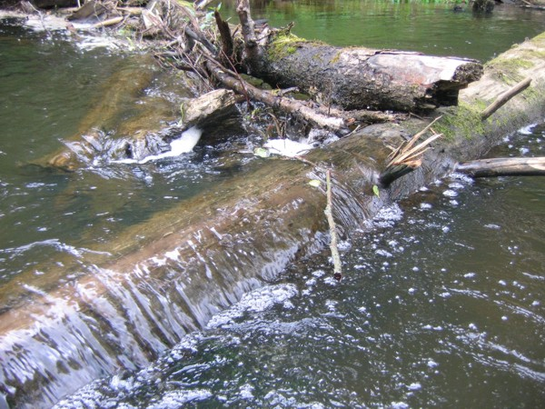 Autoriaus nuotrauka, 2005.06.23. Kliūtys Ūloje. Nuotrauka gali būti platinama pagal GFDL licenciją.